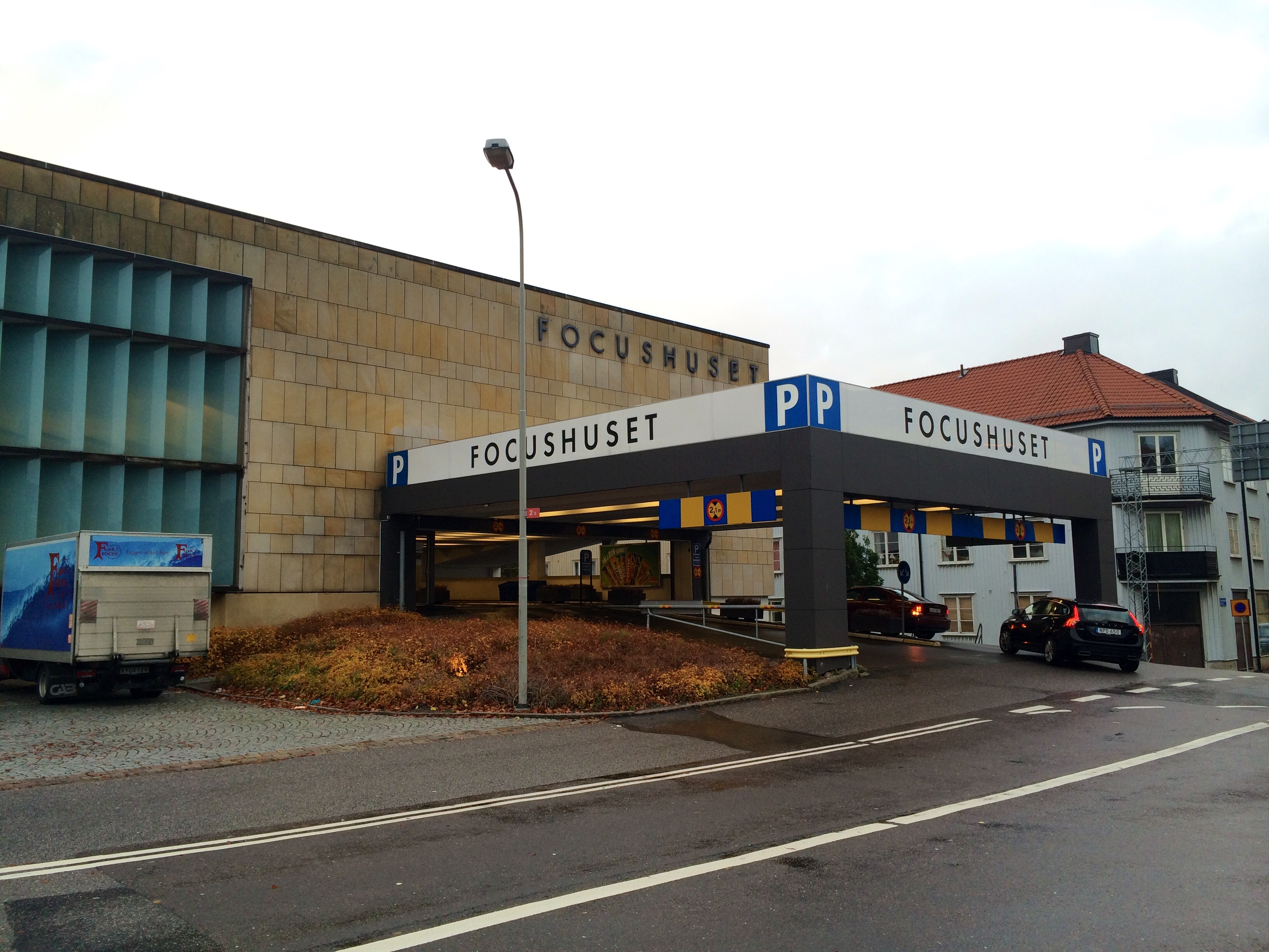 Focushusets parkeringshus entré vid Fabriksgatan 45 i Gårda, Göteborg.